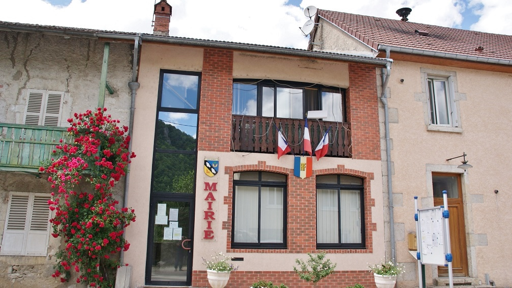 la Mairie